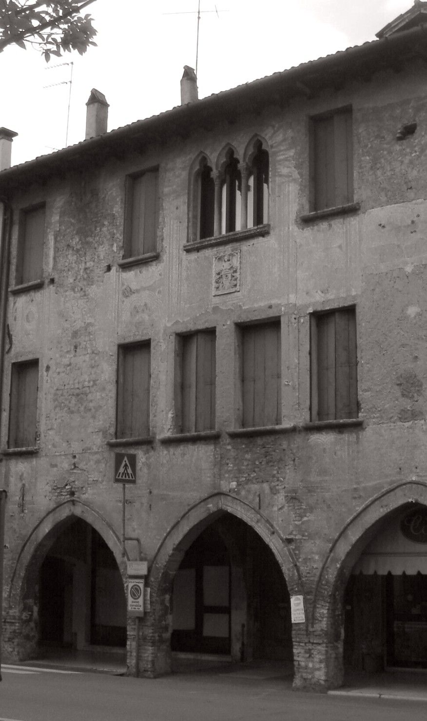 Conegliano (Treviso): Facciata della casa del Re di Cipro (XV secolo).